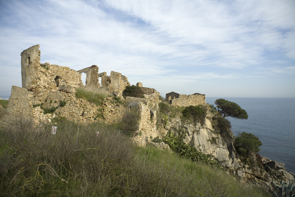 unidentified Spain